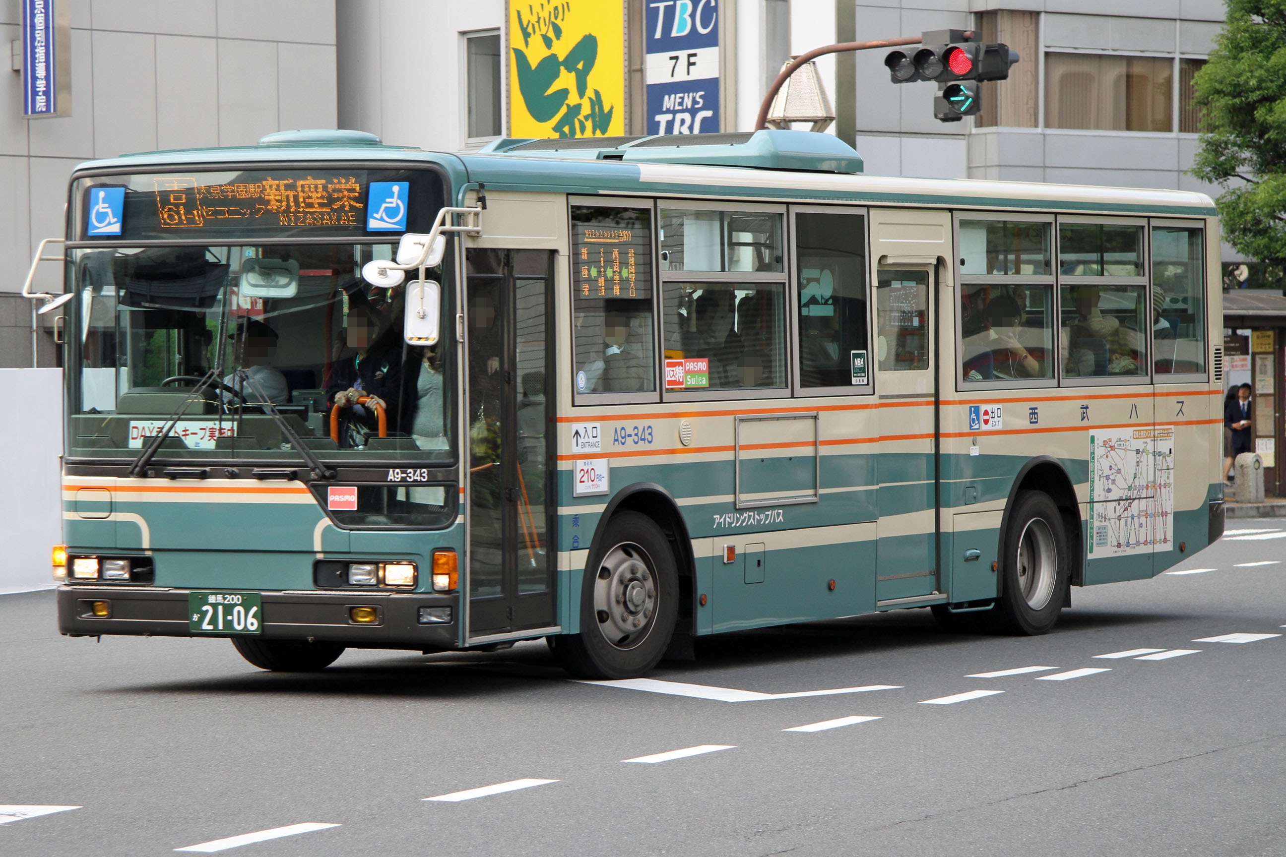 Seibu Bus Car 西武バスの車両